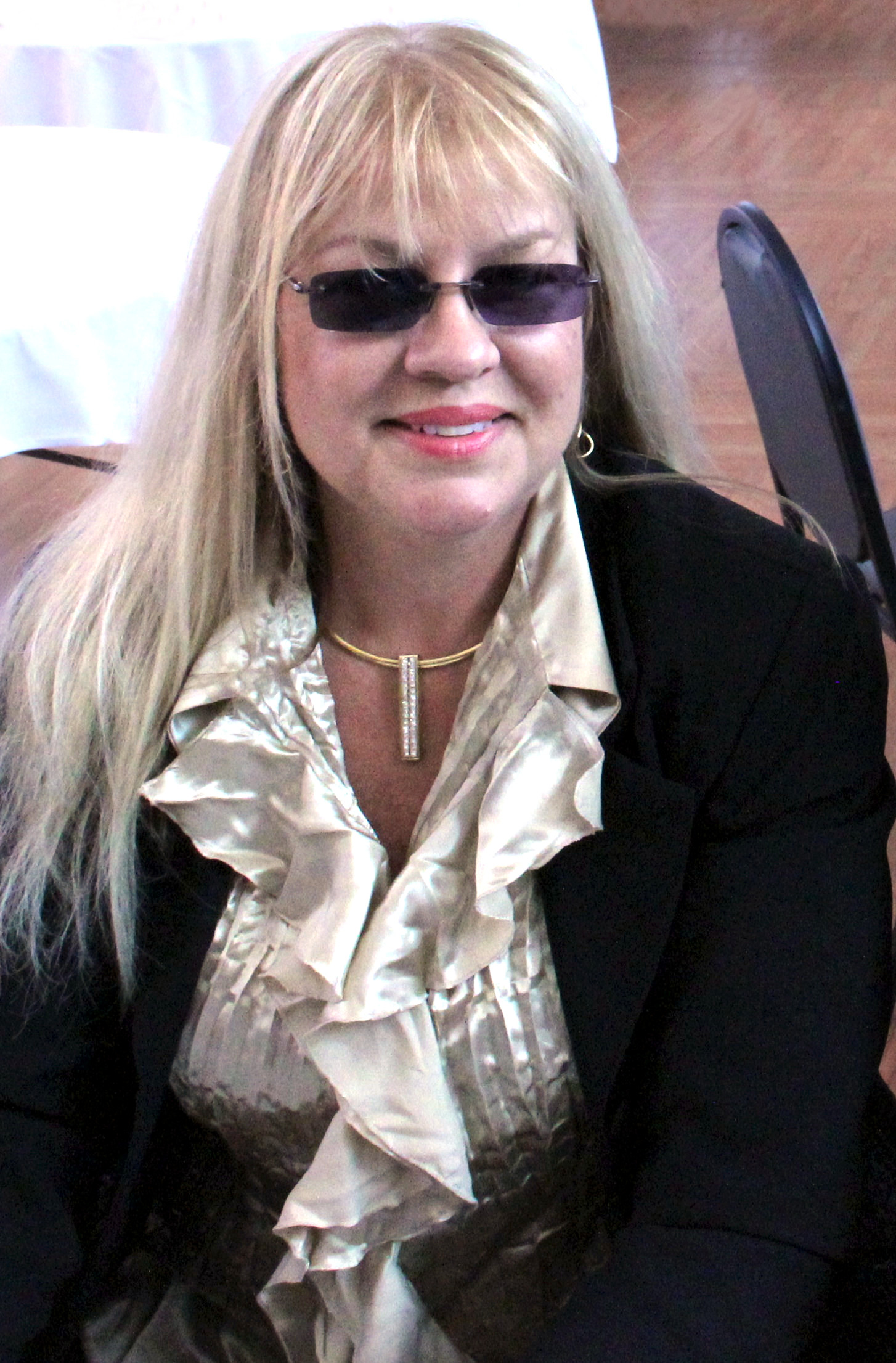 Les catcheuses Wendi Richter (à gauche) et Joyce Grable signant des autographes en 2012.